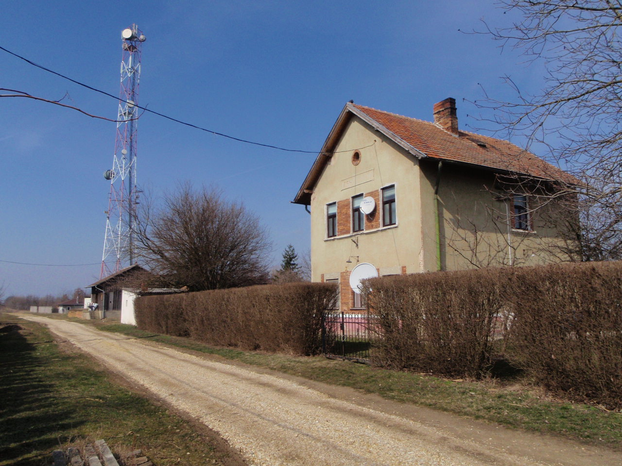 Bahnhof Vasszecseny